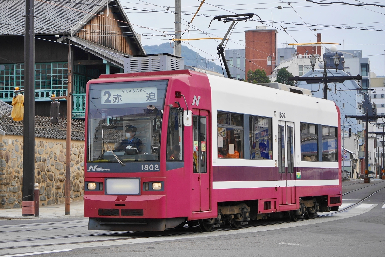 長崎電気軌道の路面電車車両、1800形1802（築町‐出島にて撮影）。